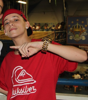 Mc Pedrinho